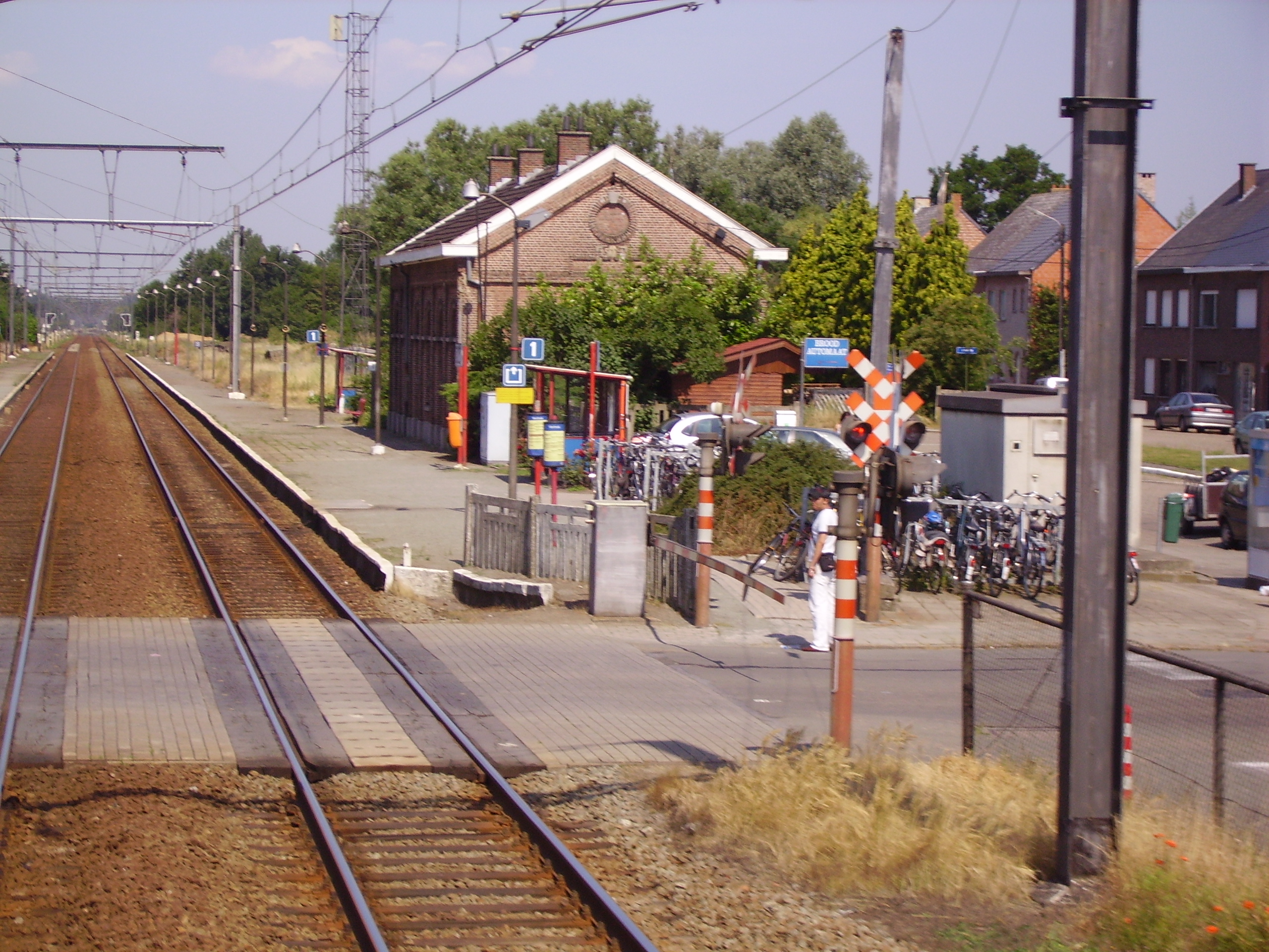 Stopplaats berlaar vanuit stuurpost 6295